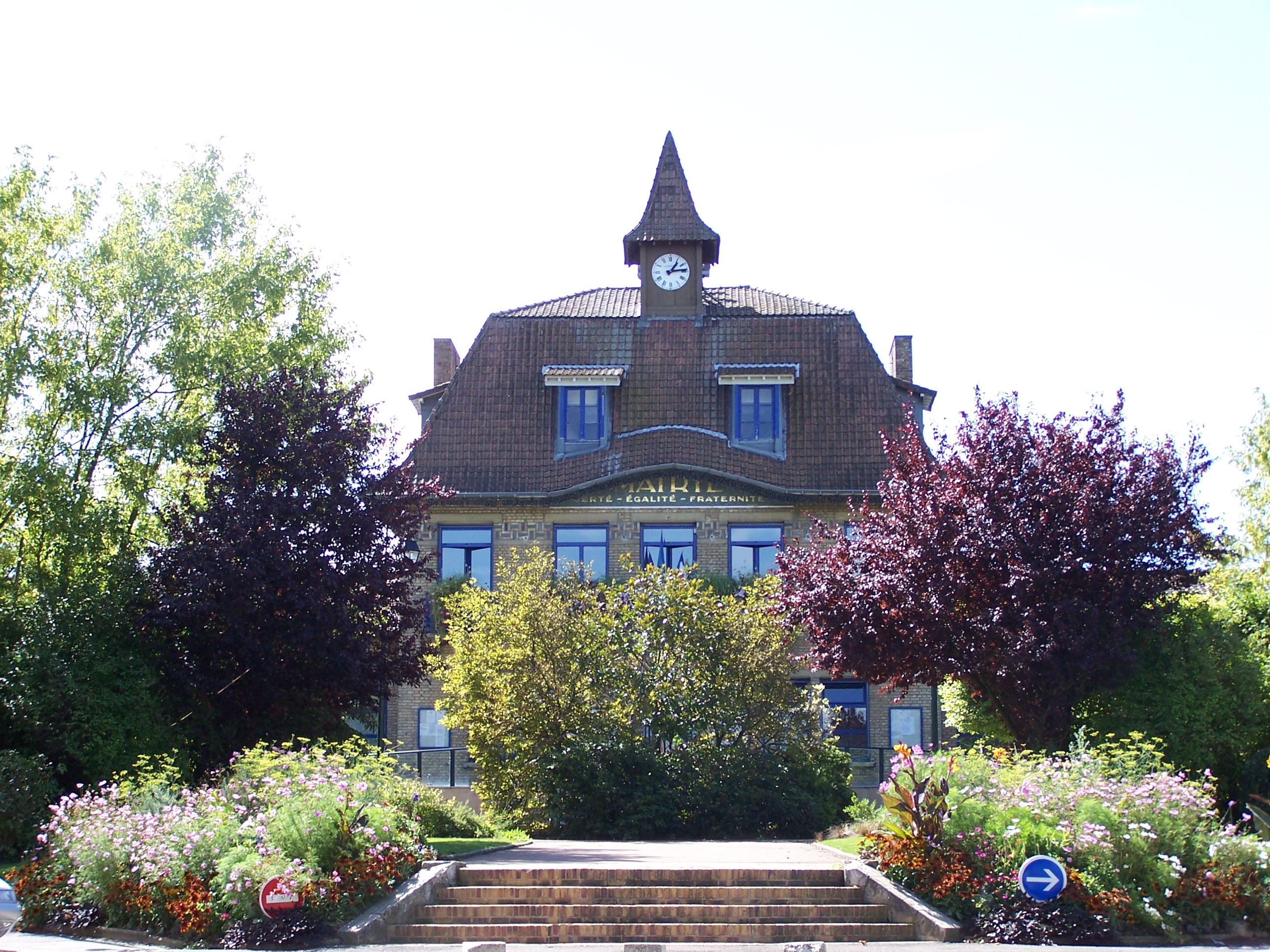 Hôtel de ville des Clayes-sous-Bois (Yvelines, France). Photo personnelle. Town hall of Les Clayes-sous-Bois (Yvelines, France). Personal photo. Auteur/Autor : Henry Salomé